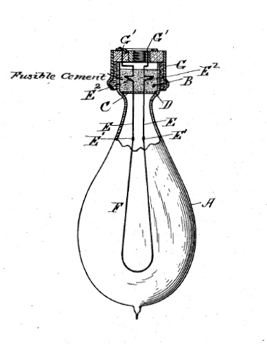 Zeichnung einer historischen Glühlampenkonstruktion mit Stopper-Design